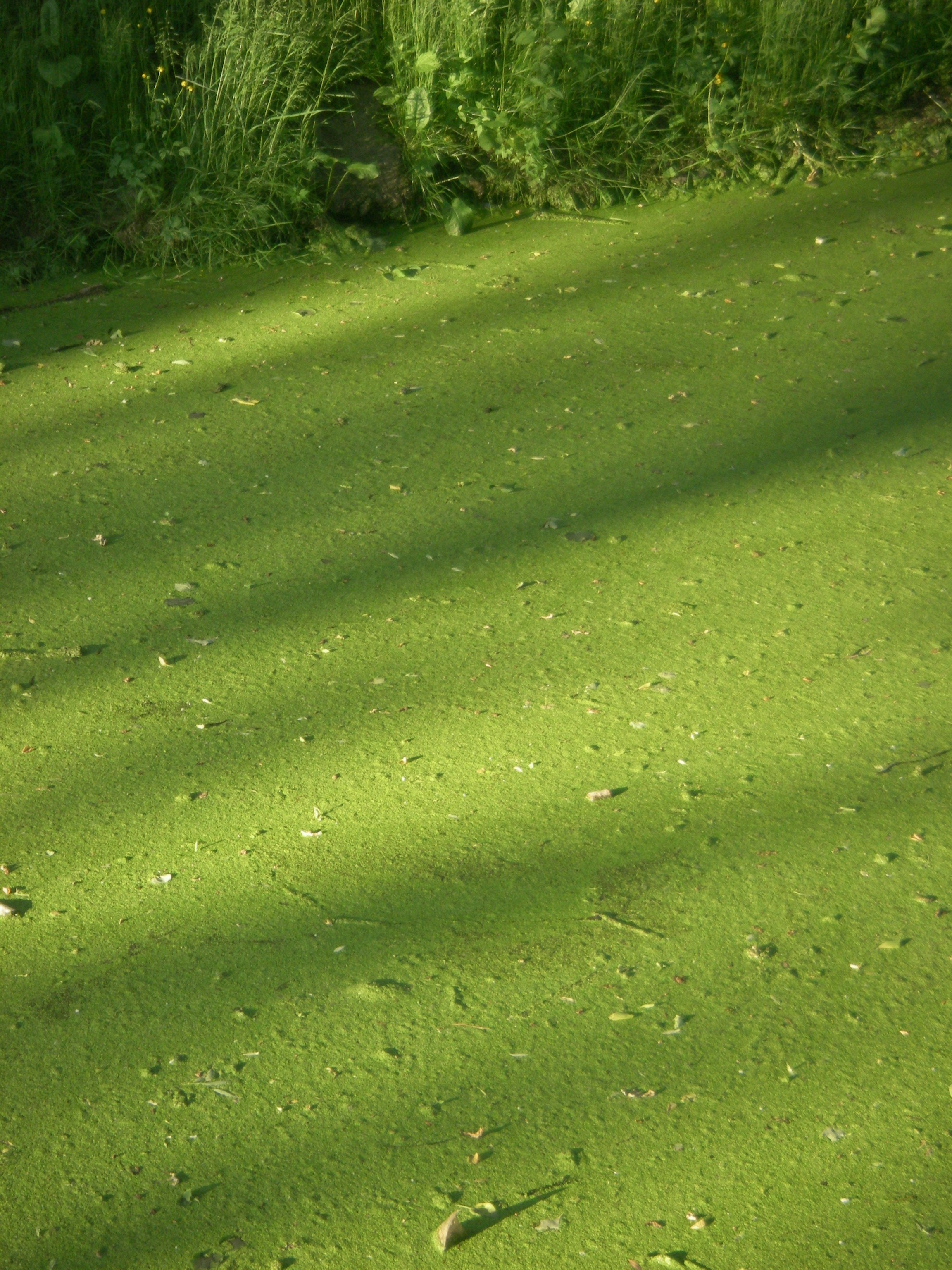 Ряска